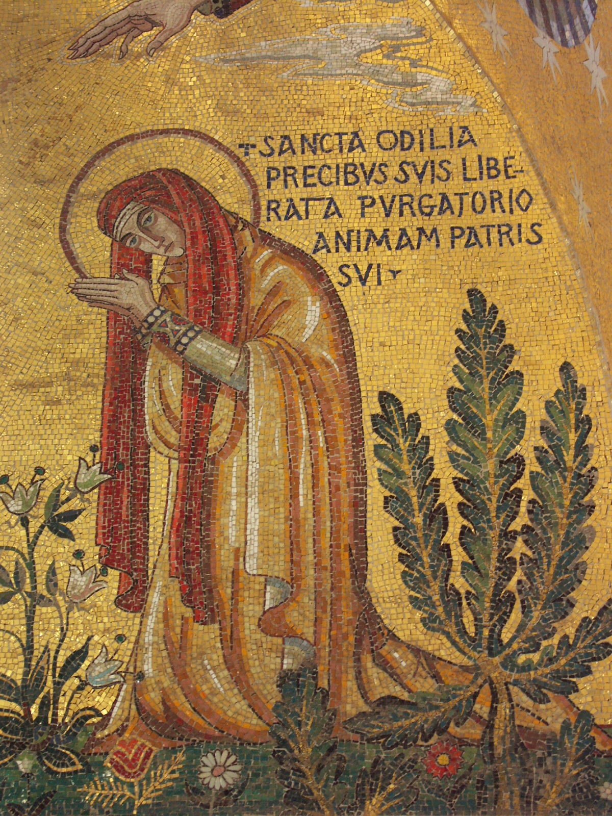 Mont Sainte-Odile, Alsace, France